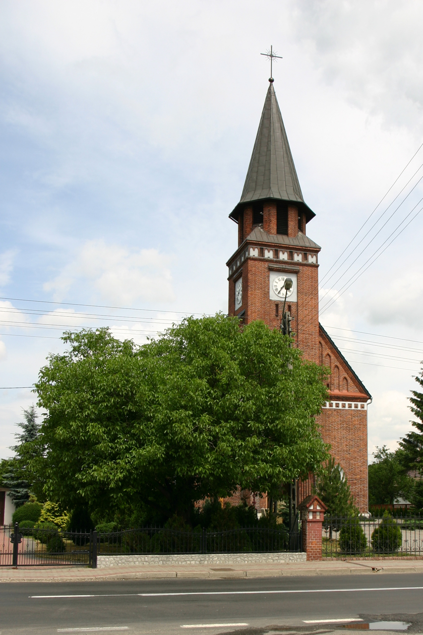 Stradunia, ul. Opolska 50a - rzymskokatolicki kościół parafialny pw. Najświętszego Serca Pana Jezusa, 1921–1922.